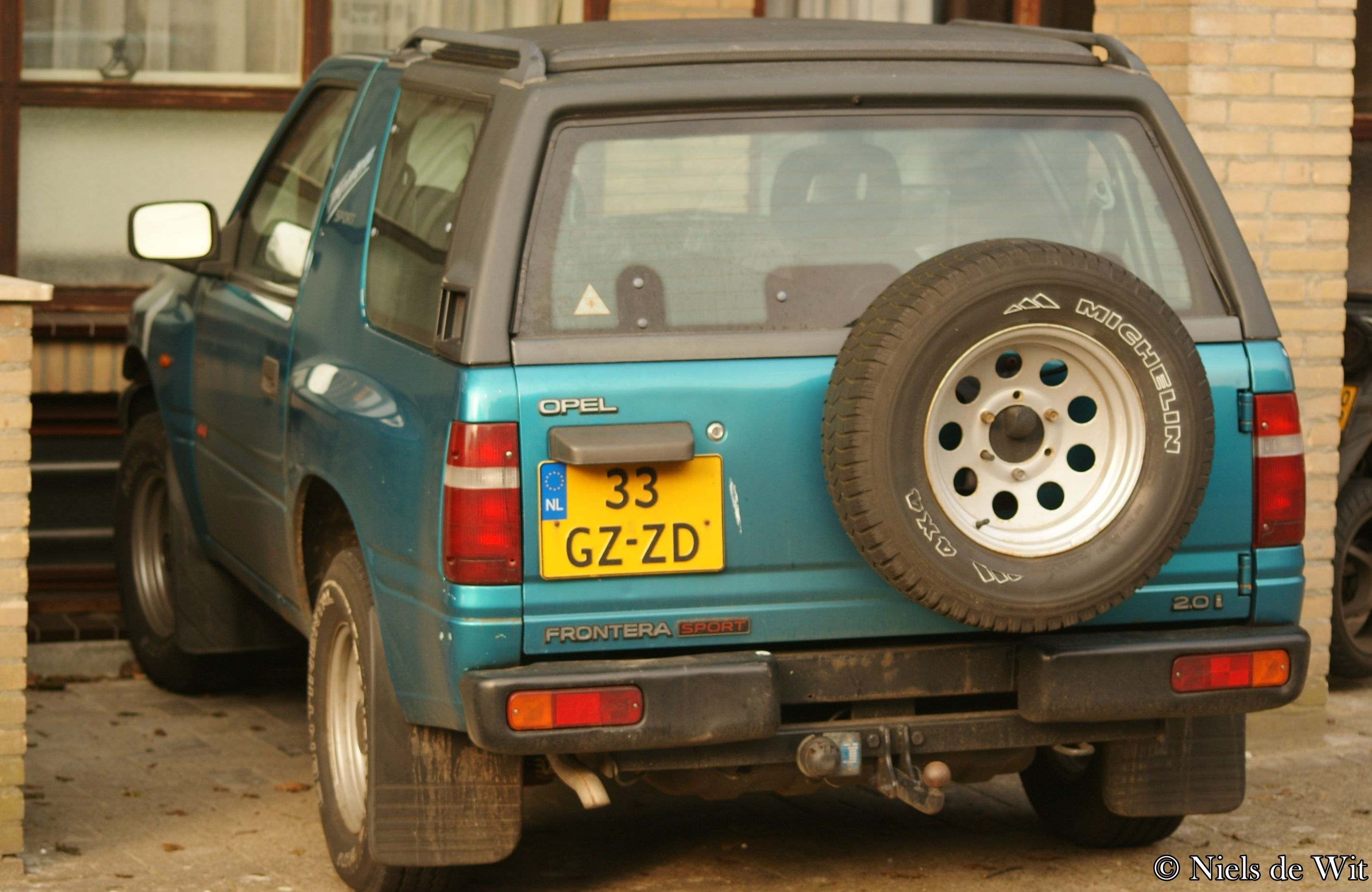 33-GZ-ZD Heuvelsepad, Ede